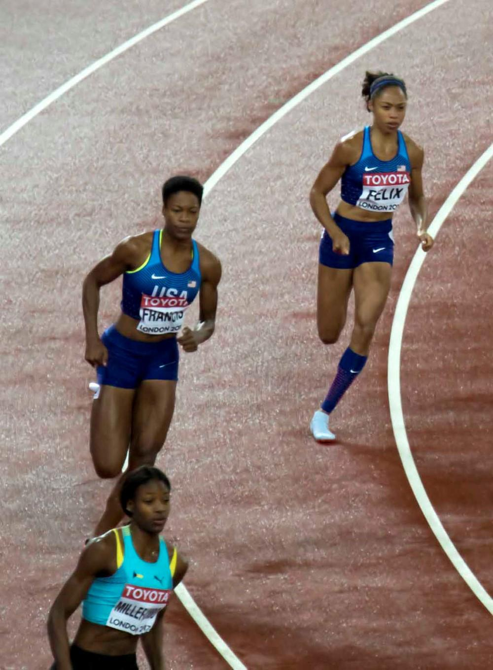 d5_9 400m felix